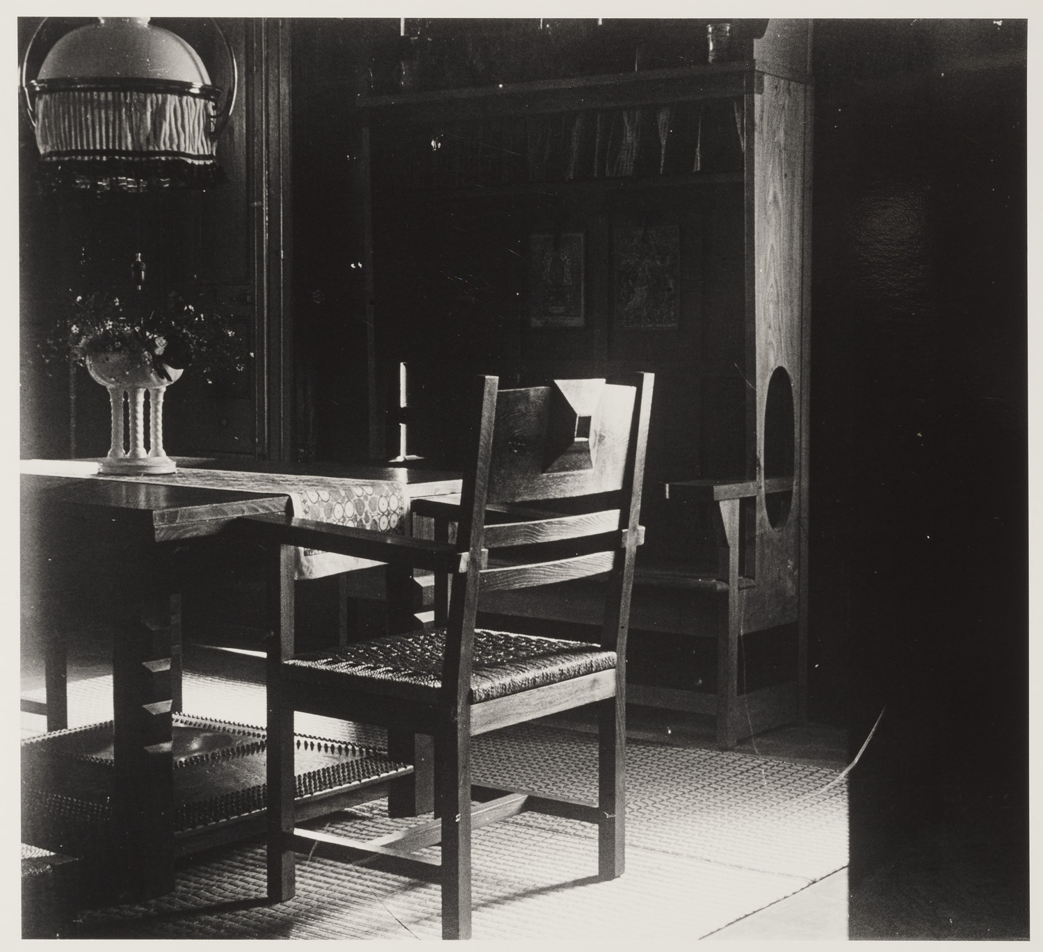 Apartament Masó Bru, al carrer de Santa Eugènia